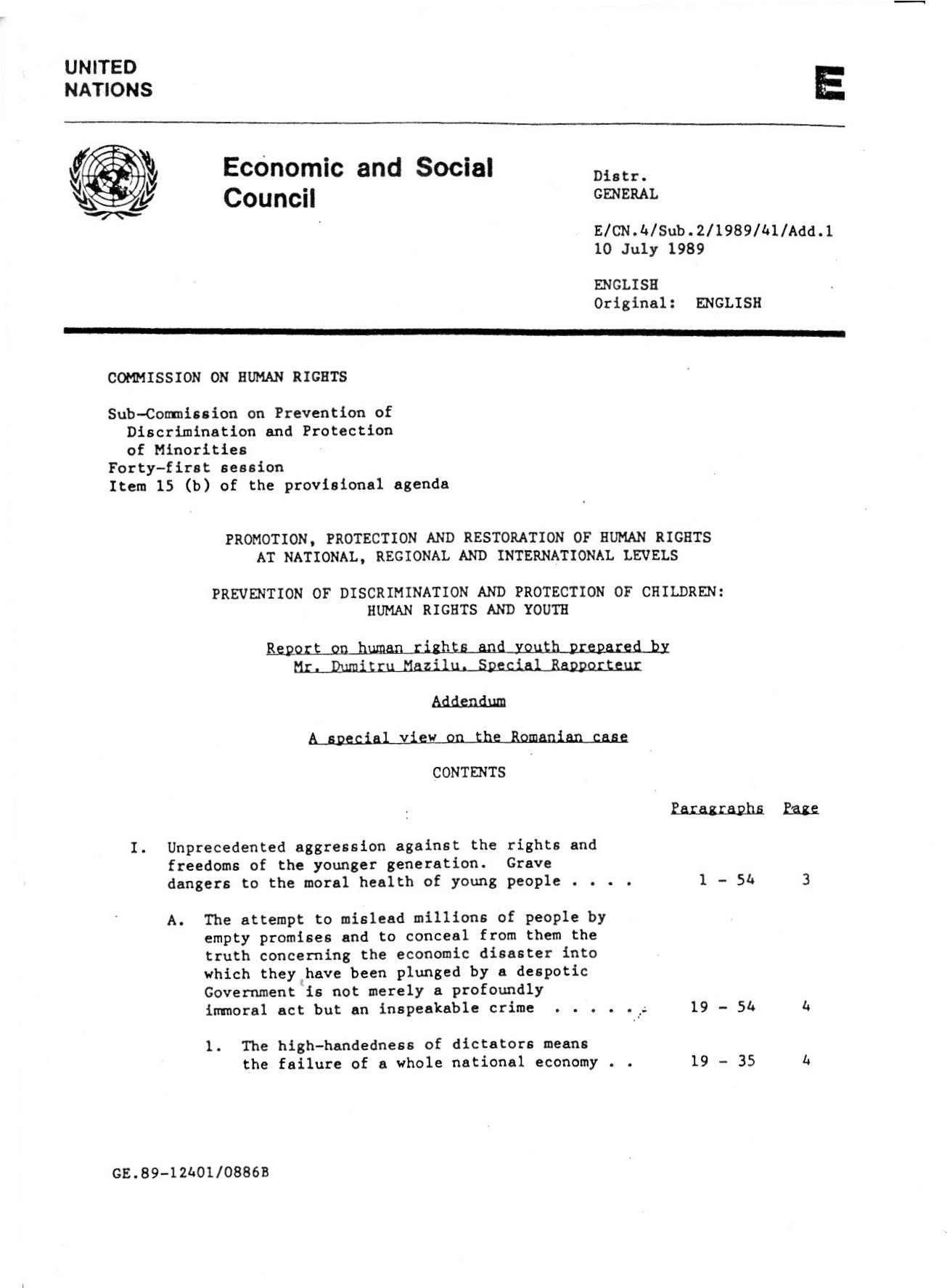 Sommaire Rapport sur les Droits de l'homme, document élaboré par Dumitru Mazilu en 1989.